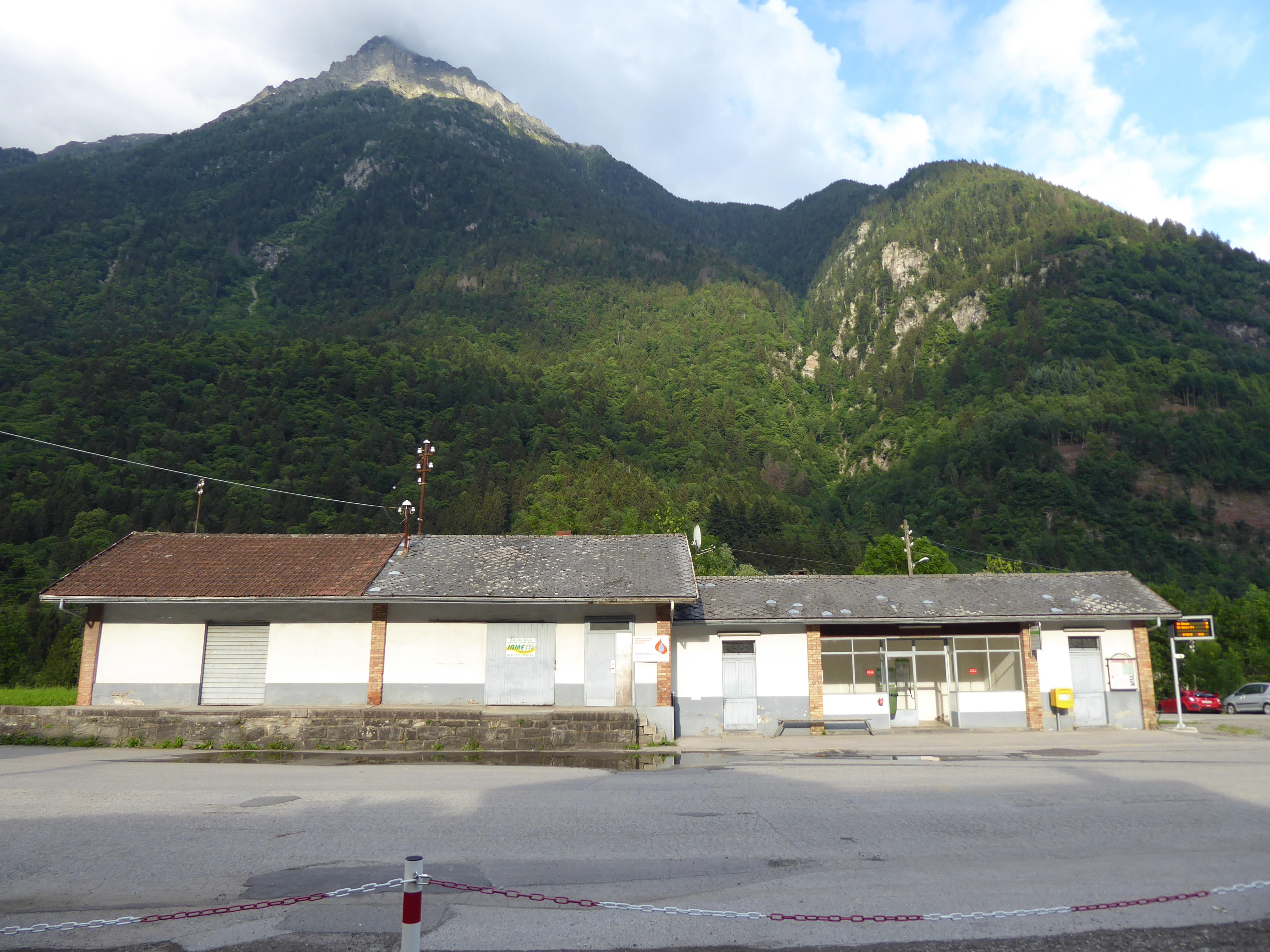 Der stillgelegte Bahnhof von Acquarossa, heute eine Busstation